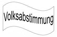 Logo der Partei Ab jetzt...Demokratie durch Volksabstimmung